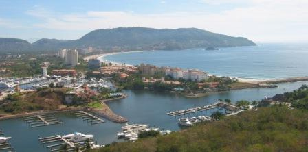 Bild över bukten utanför Ixtapa med fritidshamnen i förgrunden.